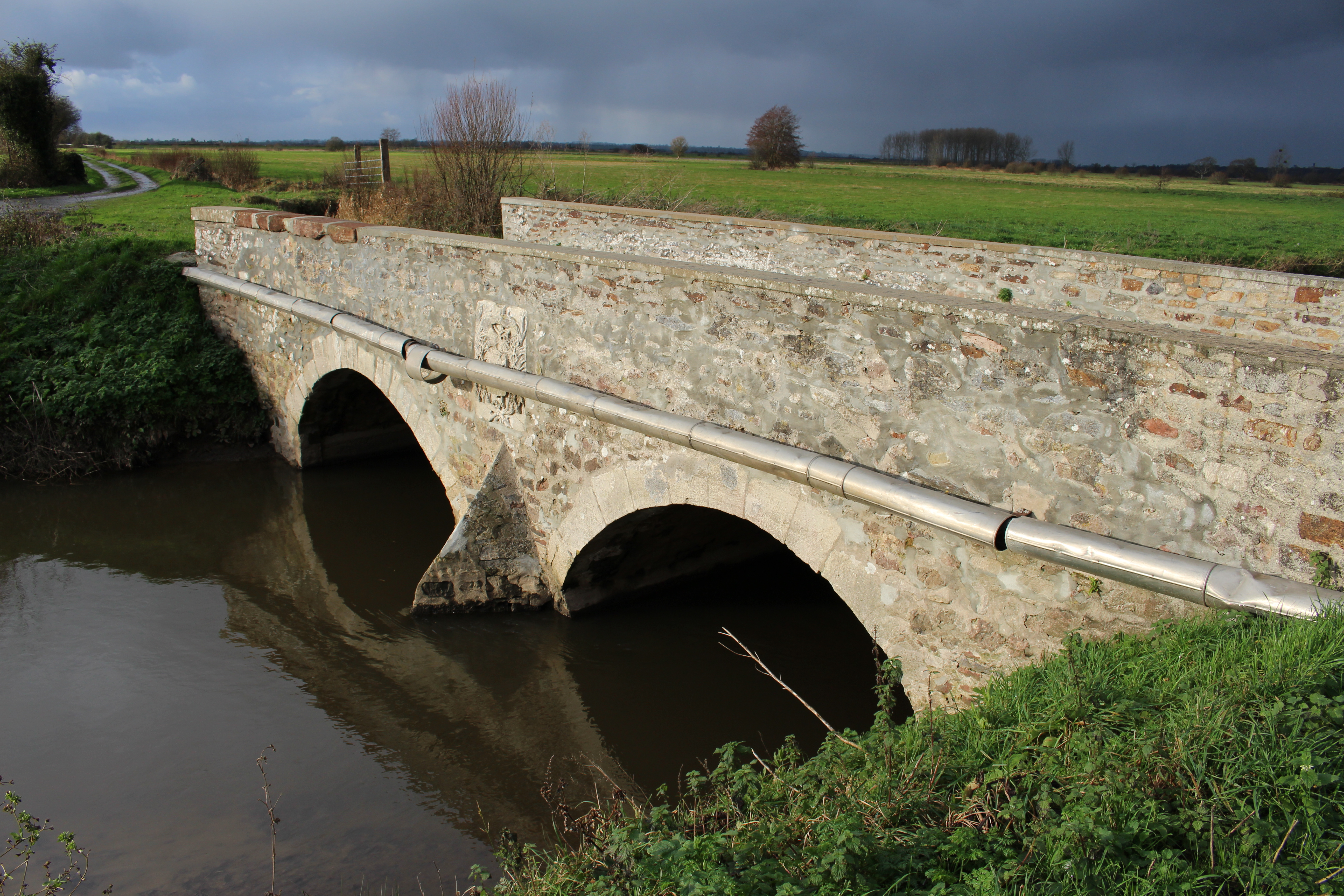 Bougue d'Elle, frontière entre Lison-Les Veys